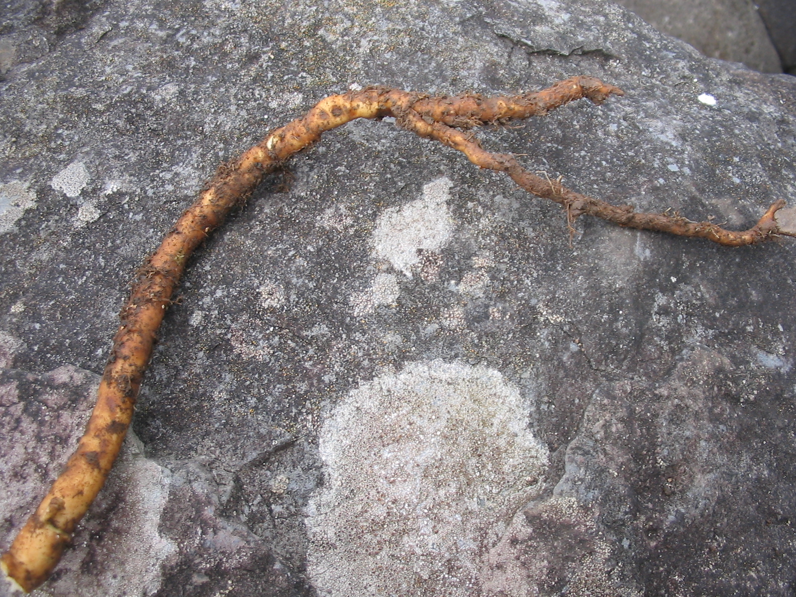 Dreiblättrige Knorpelmöhre (Ammi trifoliatum) - Base